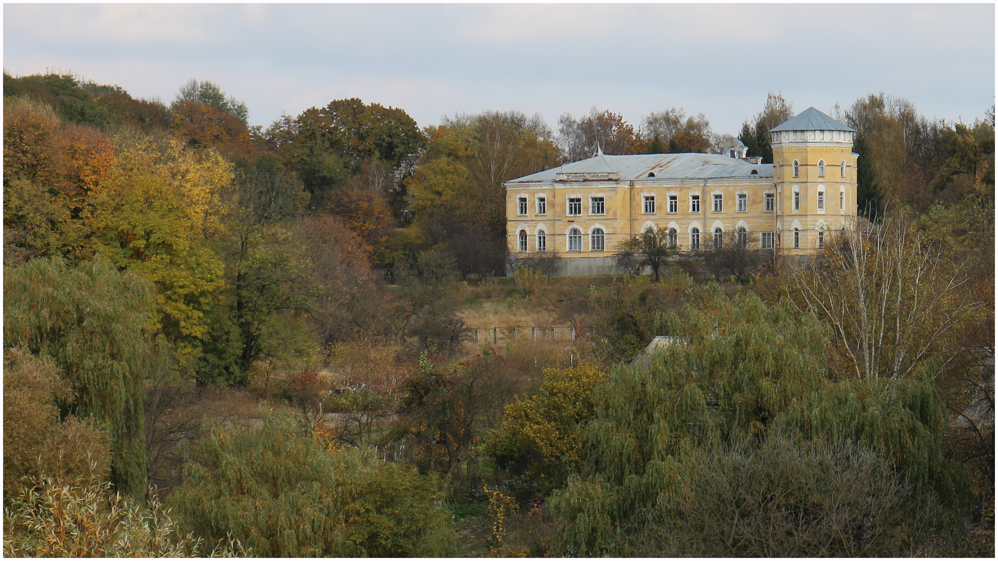 Будинок-садиба Мезенцева, Новоград-Волинський, вул. Леваневського, 19